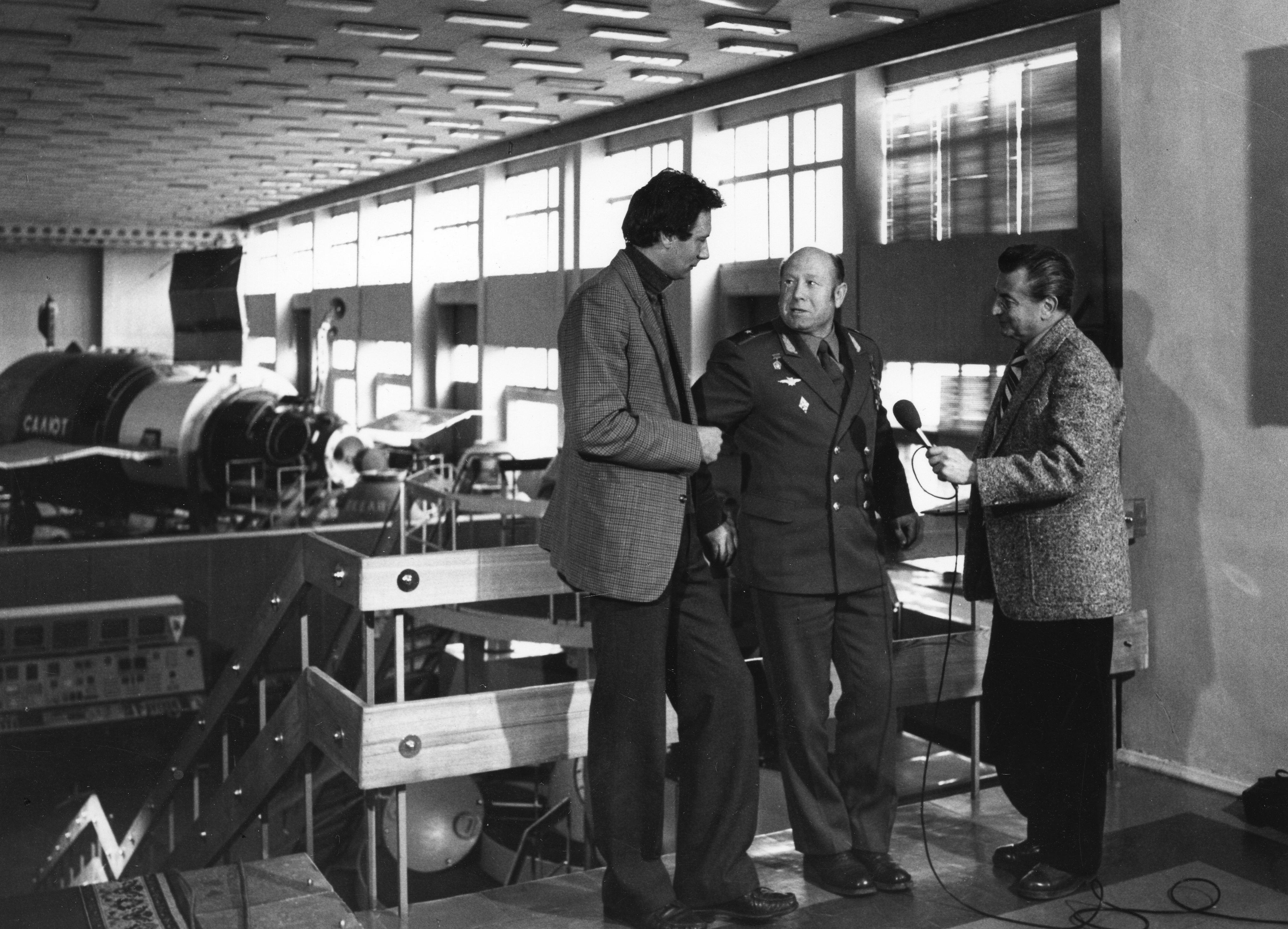 Űrhajózási múzeum, háttérben a Szaljut űrállomás eredetivel azonos mása. Csák Elemér moszkvai tudósító, Alekszej Leonov űrhajós, Vértessy Sándor riporter. Location: Russia, Moscow Tags: Soviet Union, spaceship, reporter, museum Title: Űrhajózási múzeum, háttérben a Szaljut űrállomás eredetivel azonos mása. Csák Elemér moszkvai tudósító, Alekszej Leonov űrhajós, Vértessy Sándor riporter.